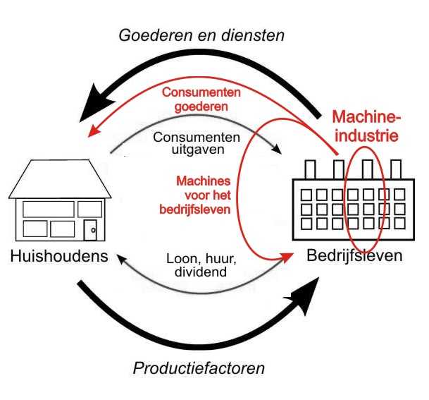 Machine-industrie in kringloopmodel van de economie. Afbeelding gebaseerd op File:Kringloopmodel van de economie.jpg